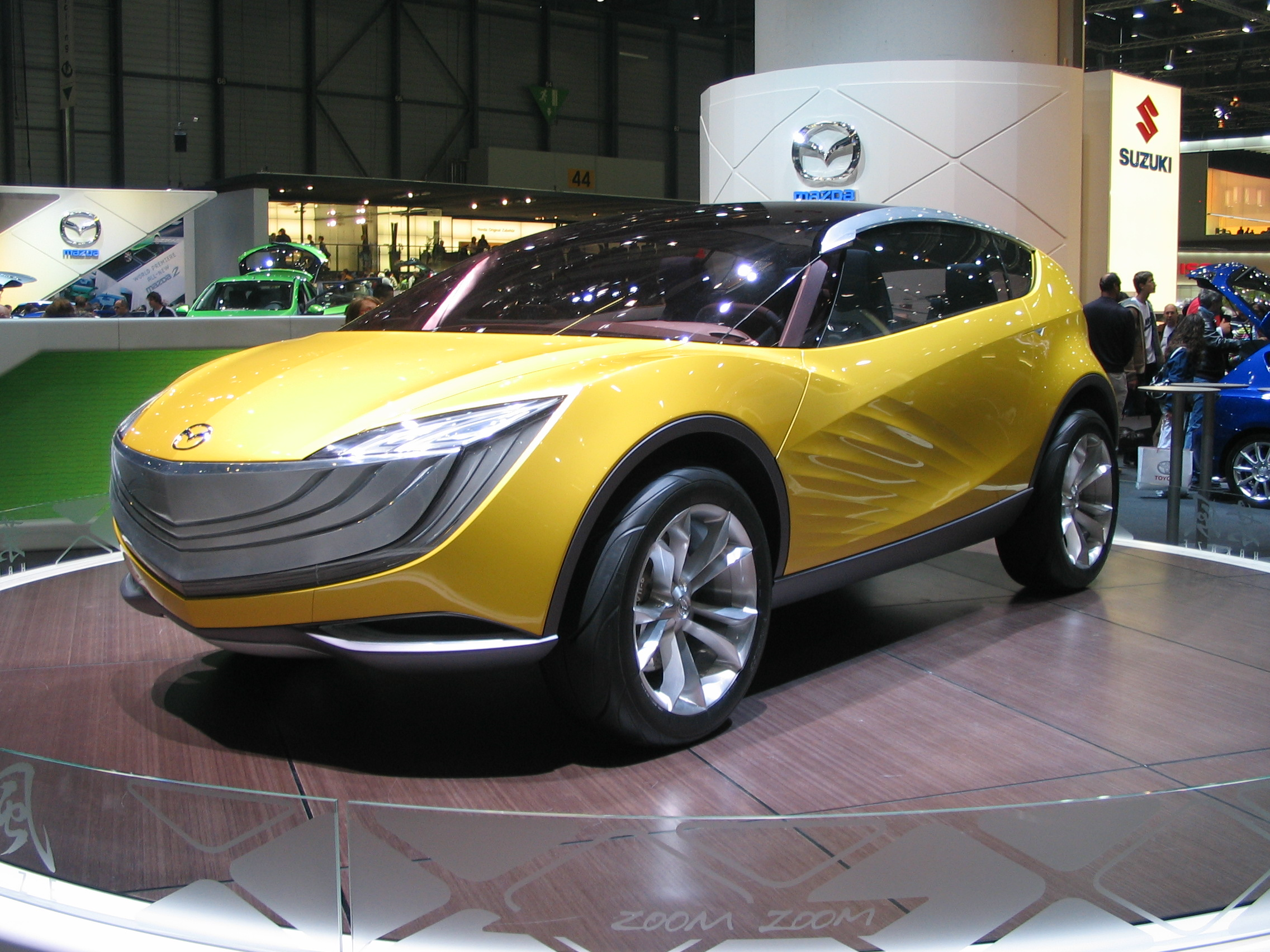 Concept-car Mazda Hakaze, salon de Genève 2007 -- interprétation de SUV compact.